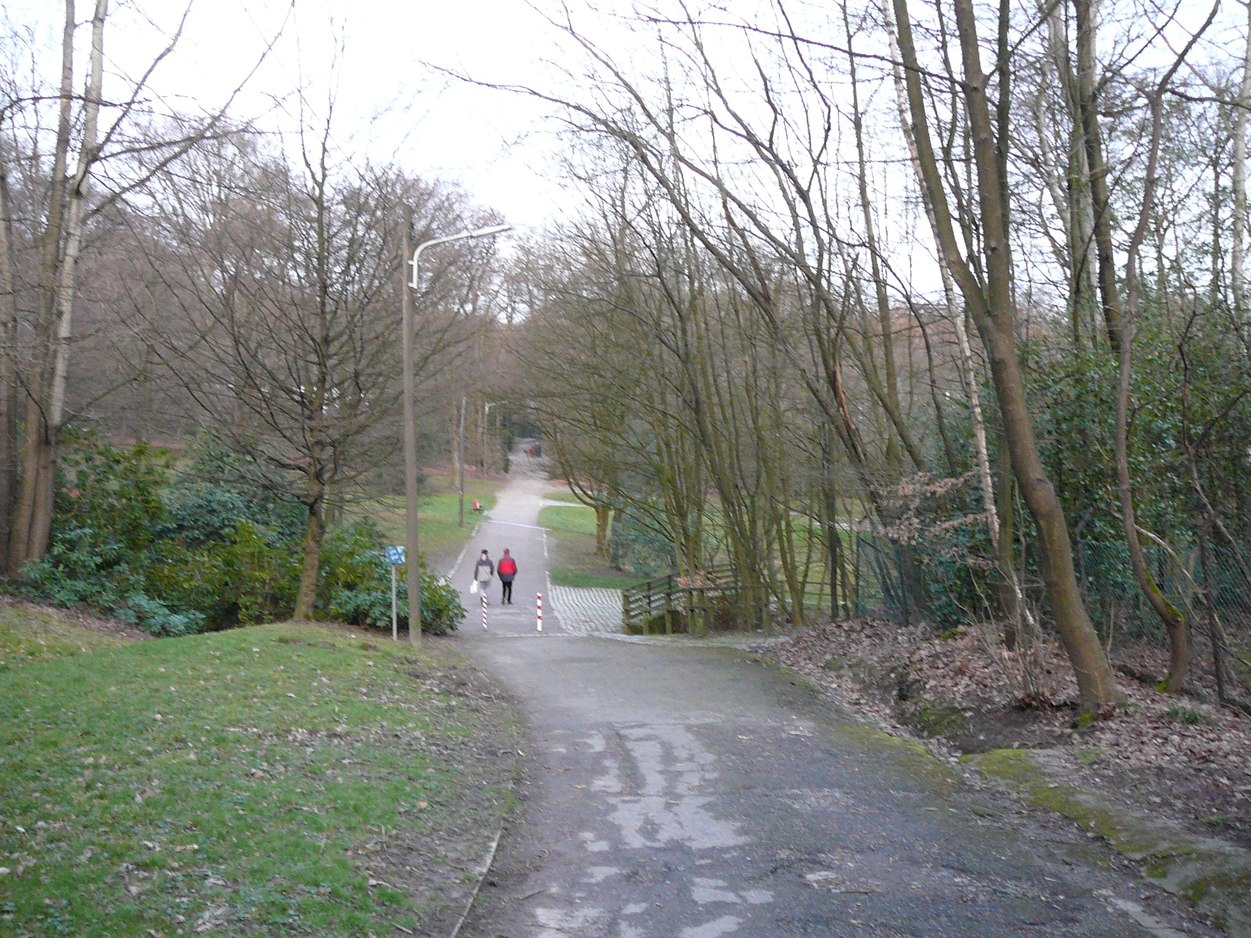 Vogelsangstraße, Wuppertal-Elberfeld